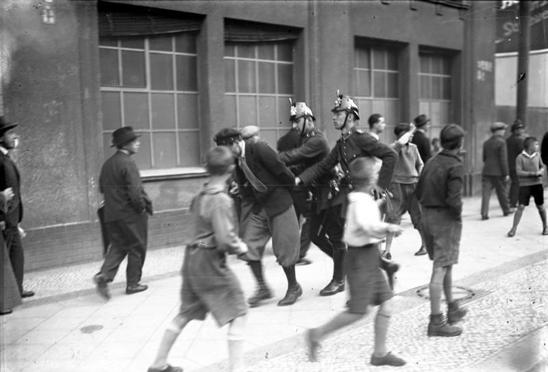 Politische Unruhen in Berlin ! Polizei schreitet gegen kommunistische Demonstranten ein. Verhaftung eines Demonstranten in den Strassen Berlins.